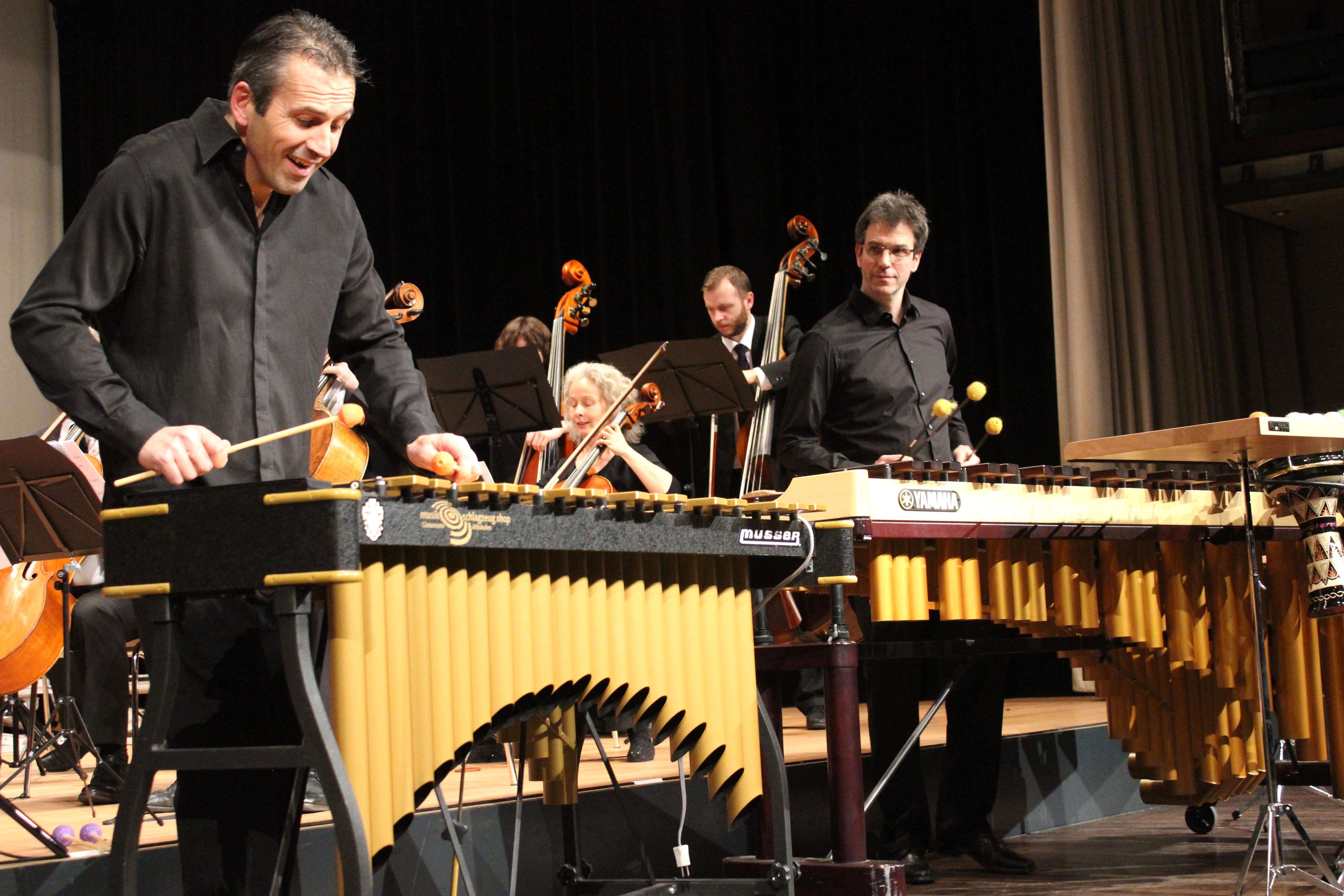 Das Duo Schlagart spielt Marimba und Vibraphon bei einem Orchesterkonzert in Schwyz. Das Duo besteht aus den Perkussionisten Klaus Schwärzler (links) und Raphael Christen.